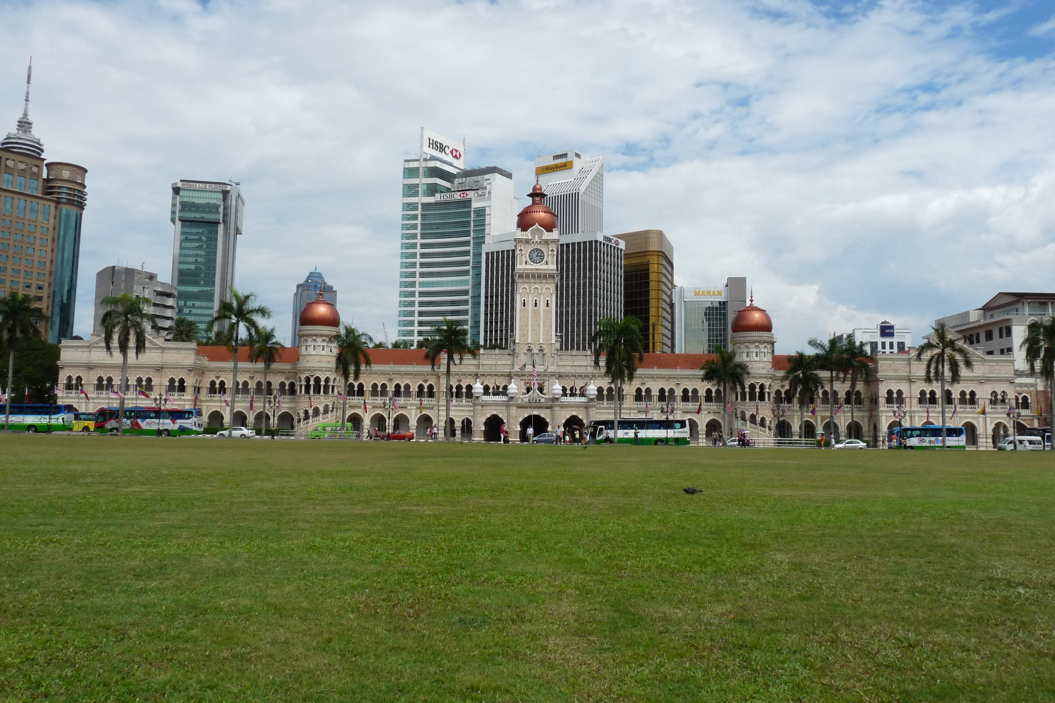 Kuala Lumpur